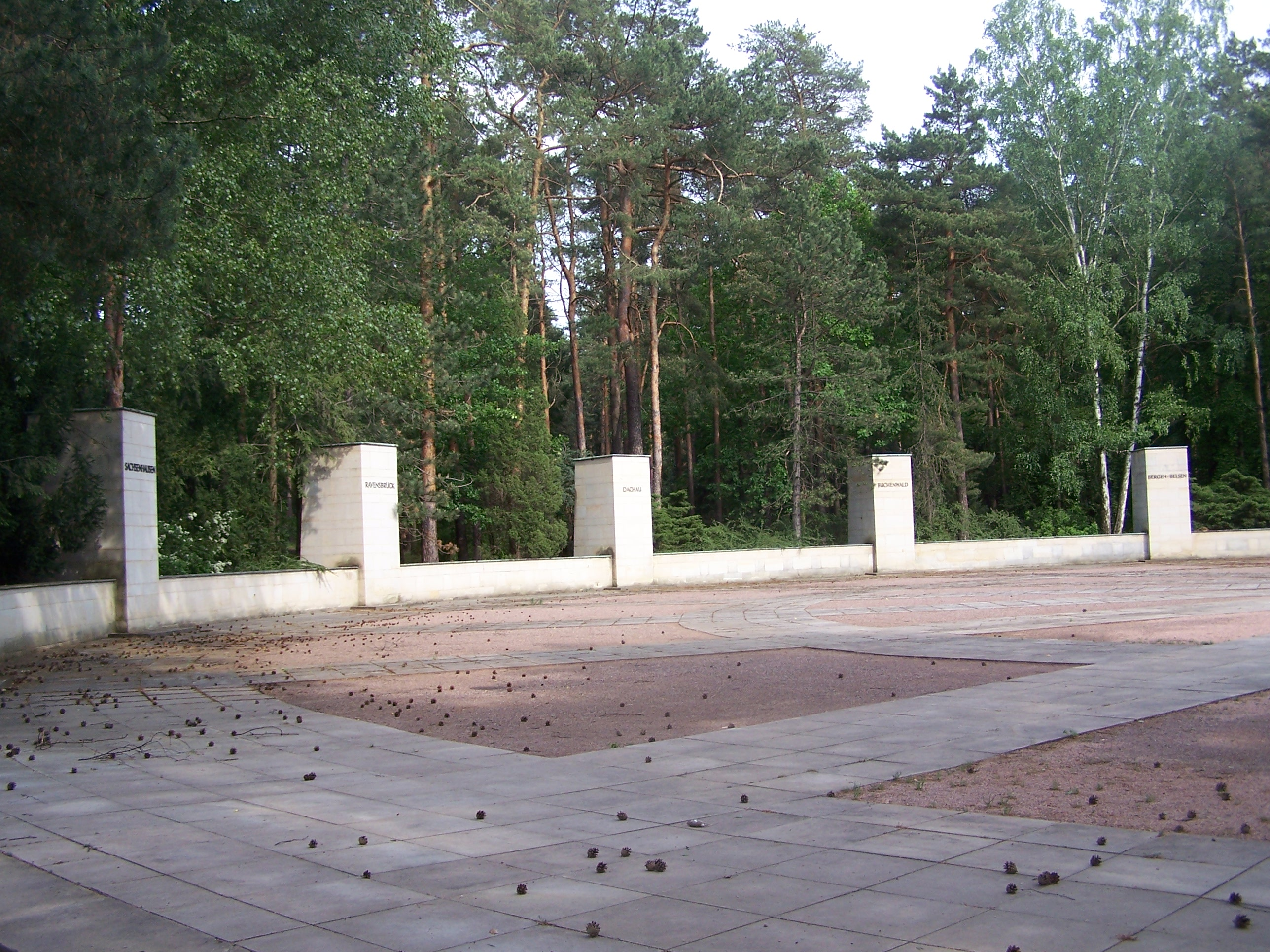 Heidefriedhof Dresden; Detailansicht des Rondells zum Gedenken der Opfer des Zweiten Weltkriegs, auf den Stelen von links nach rechts: Sachsenhausen, Ravensbrück, Dachau, Buchenwald, Bergen-Belsen